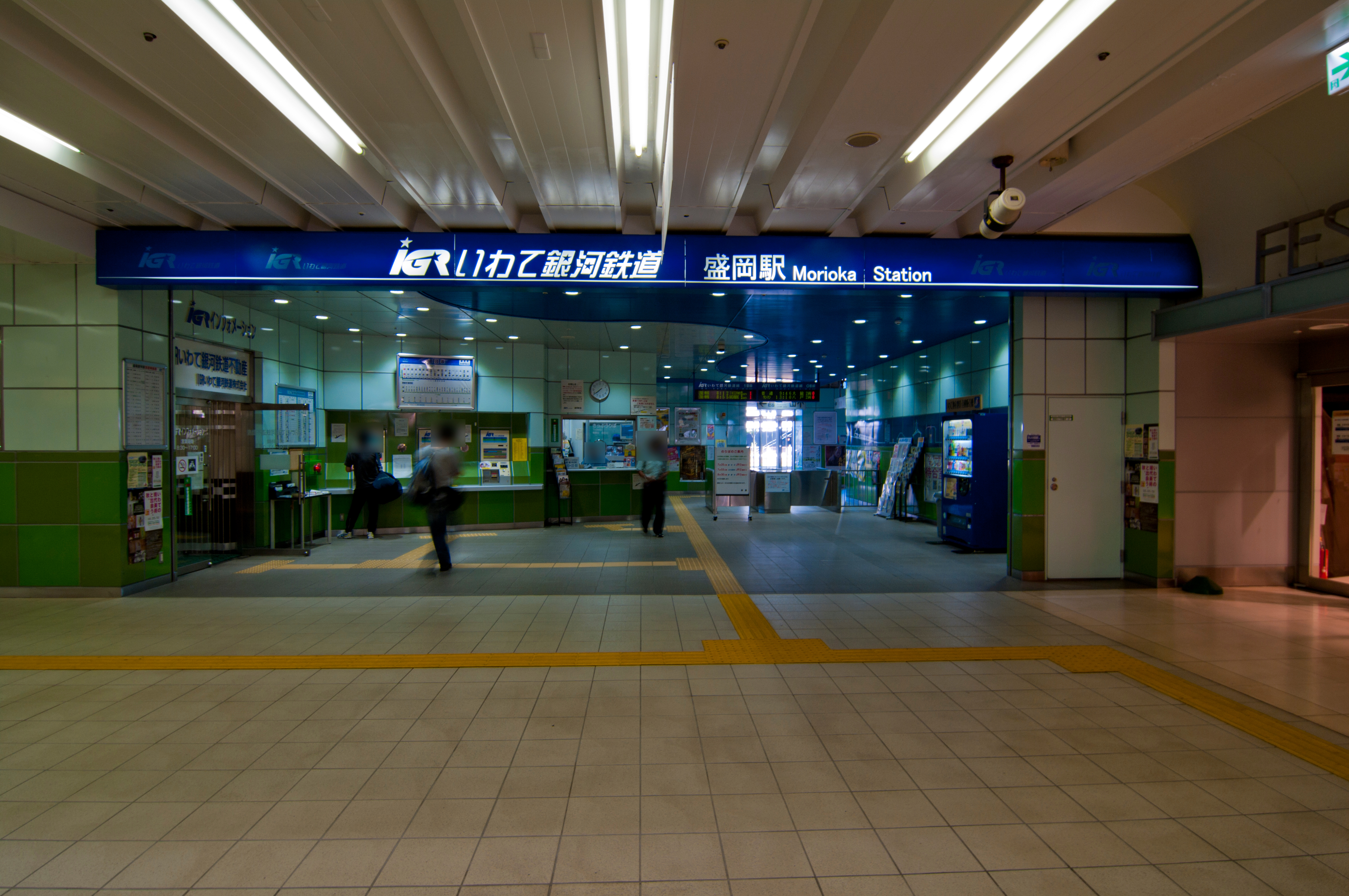 いわて銀河鉄道株式会社盛岡駅